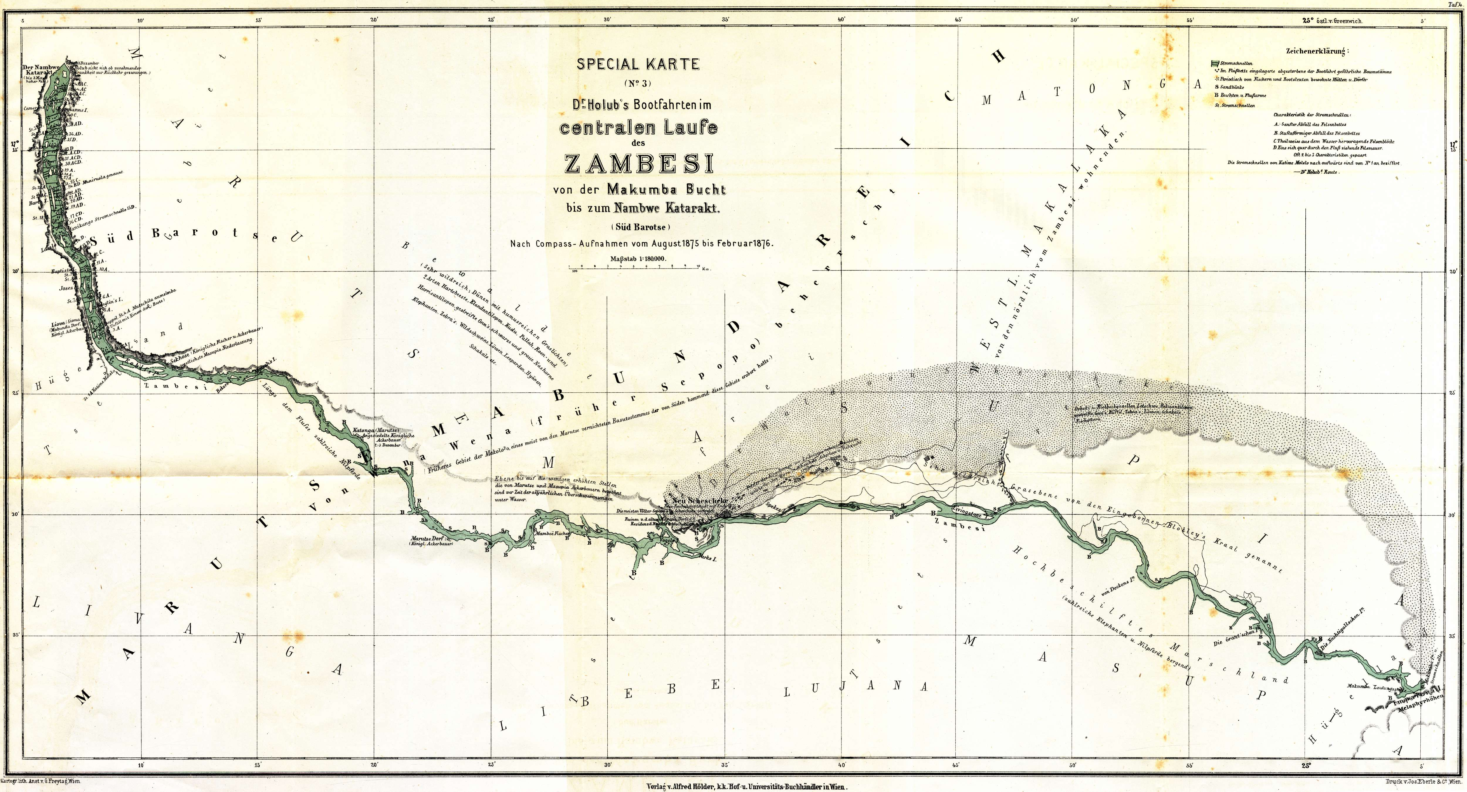 Emil Holub (Holice, 1847. október 7. – Bécs, 1902. február 21.), cseh orvos, utazó, Afrika-felfedező, író, néprajzi gyűjtő.